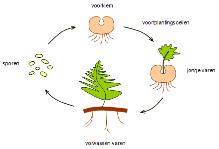 Eigen productie